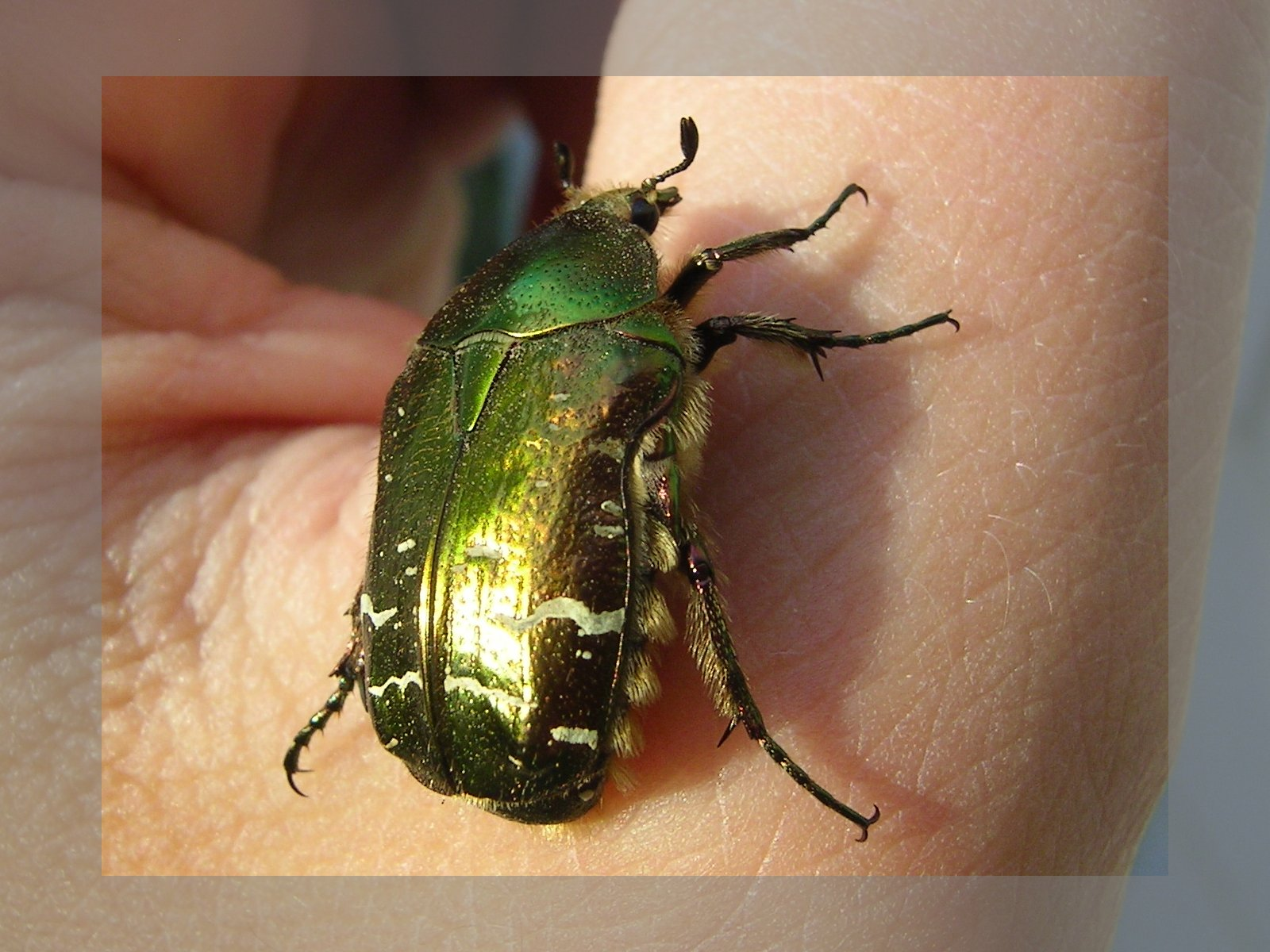 Rosenkäfer